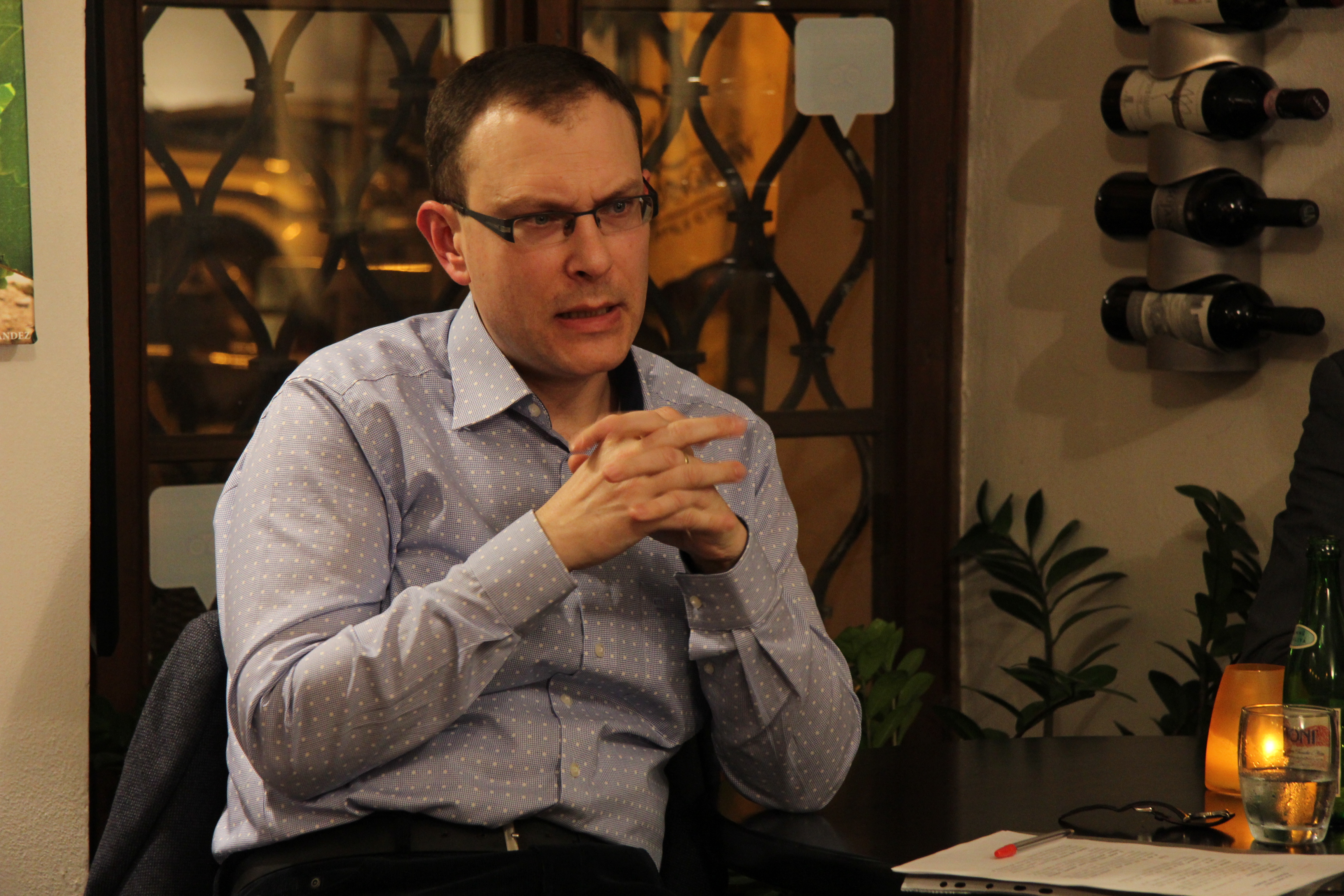 Ústavní právník Jan Kysela na kavárenském semináři (2017)